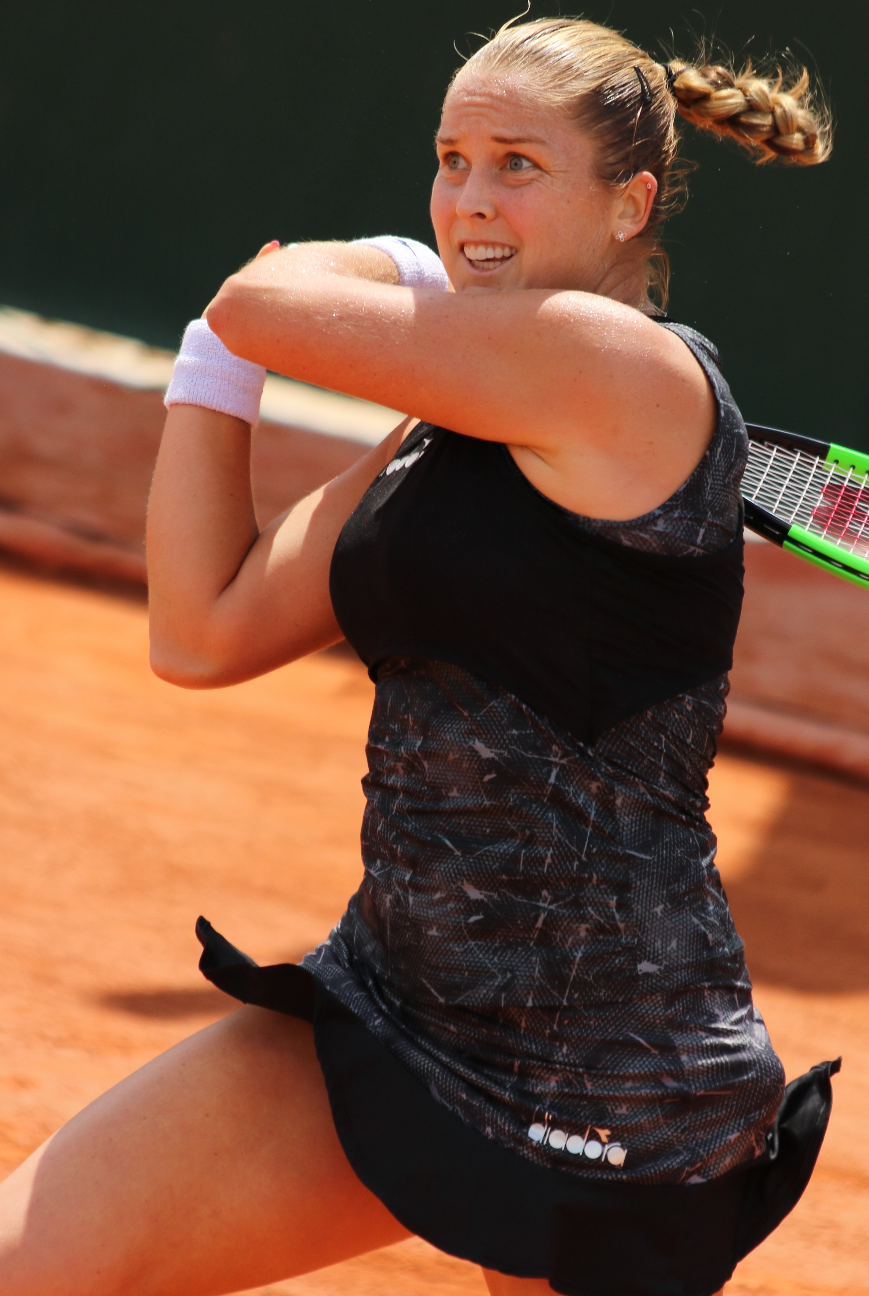 Rogers RG19 (27)